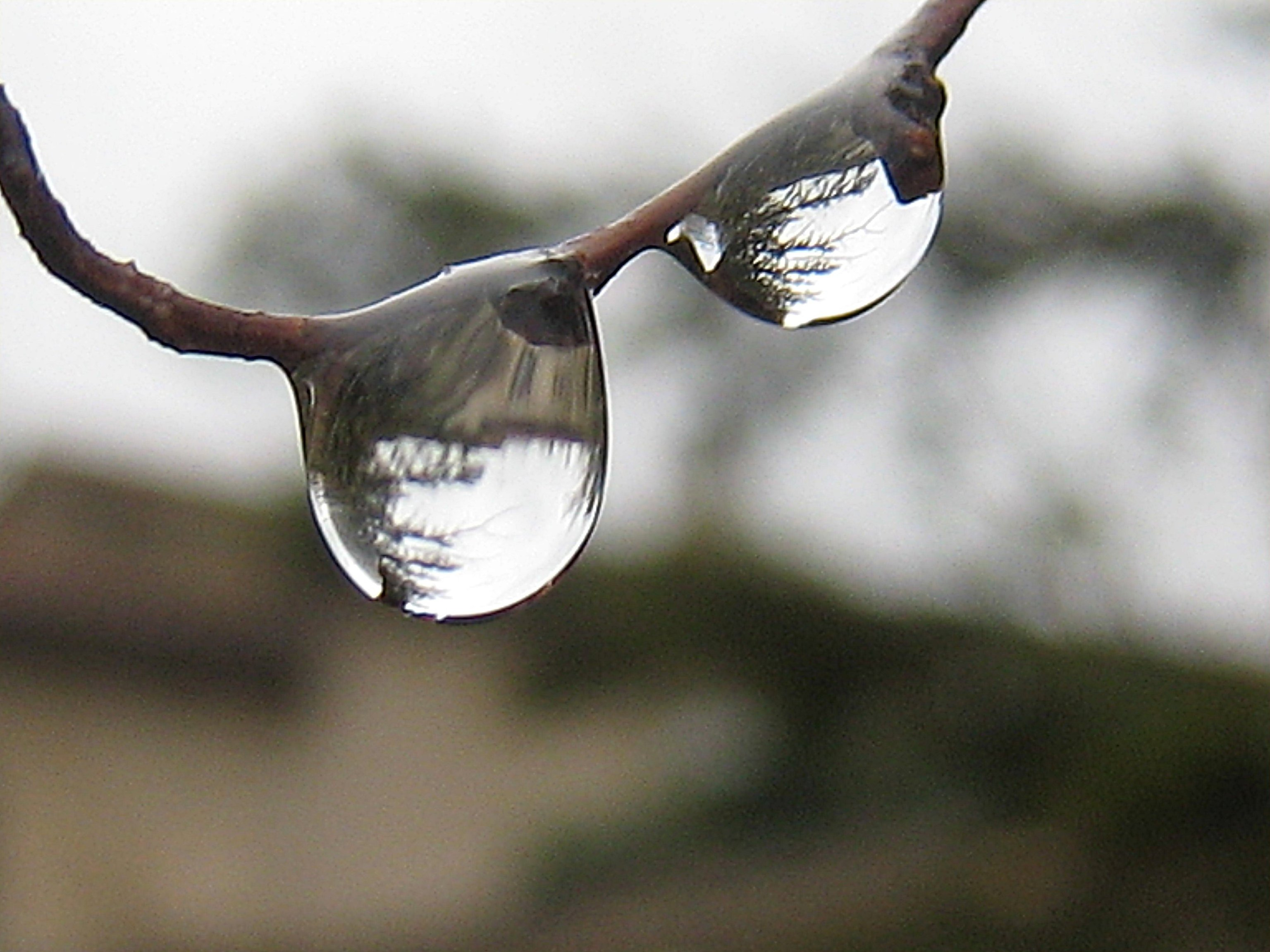 Les Salvages (81) 20070325, Au détour d'un sentier, j'ai rencontré la pluie...elle portait des lunettes !.JPG